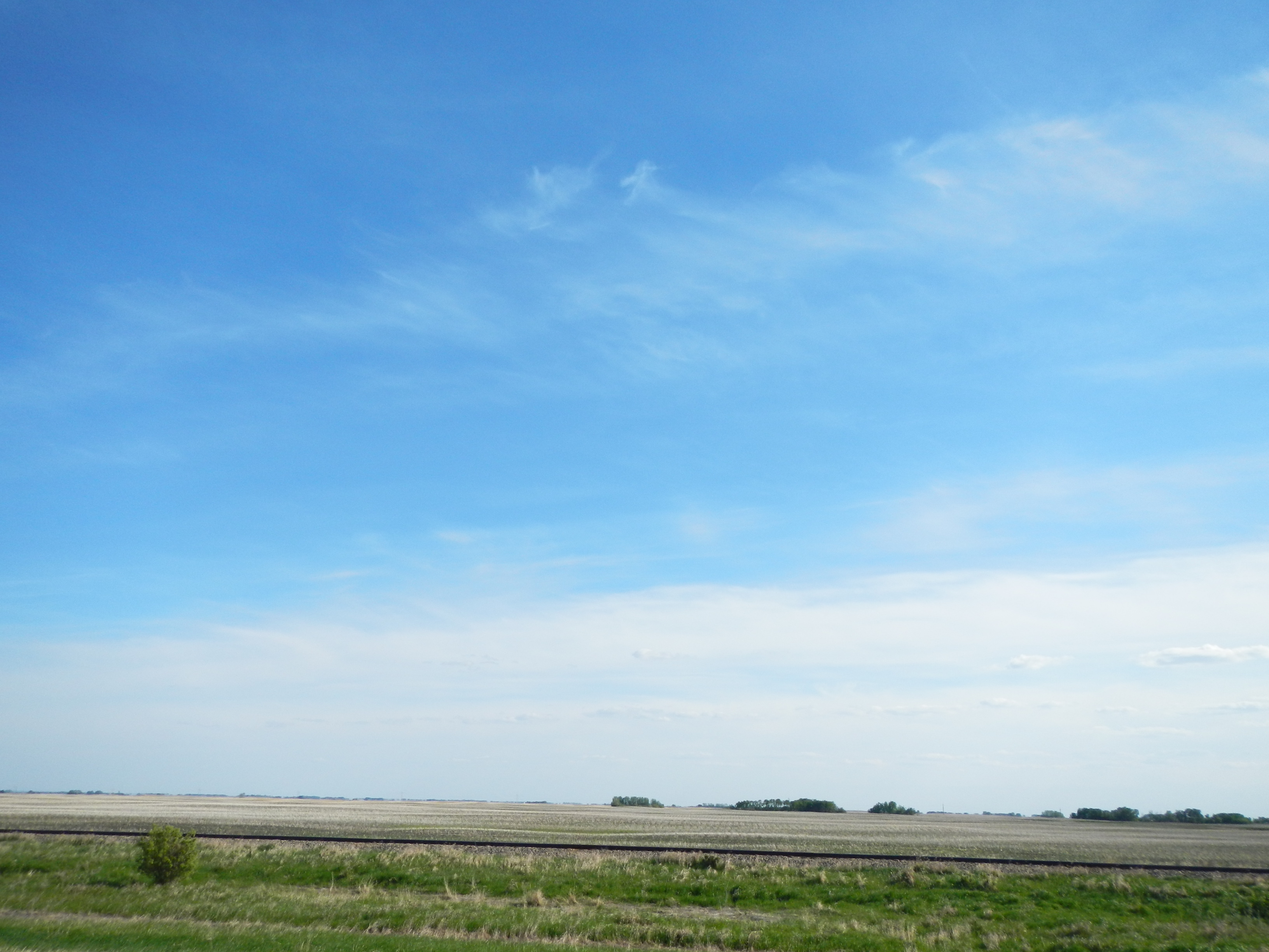 Prairie Rose No. 309, SK, Canada